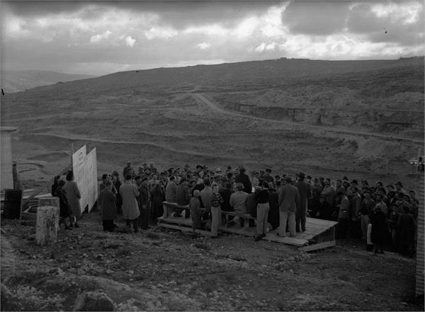 ירושלים - חגיגת הנחת היסוד לשכונה החדשה ברחביה המורחבת הנבנת על אדמת הקק"ל.